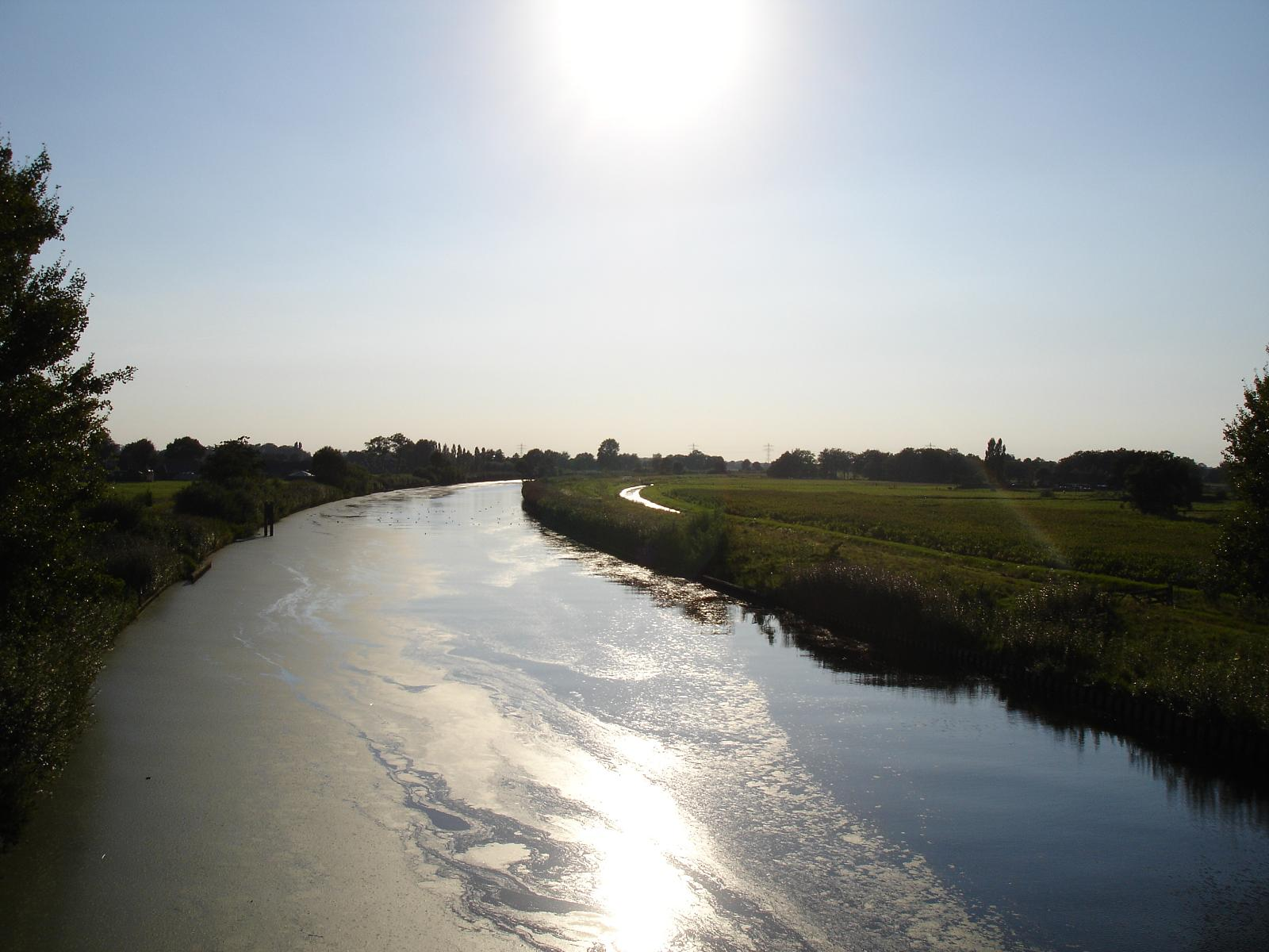 20070805 03 Meppel